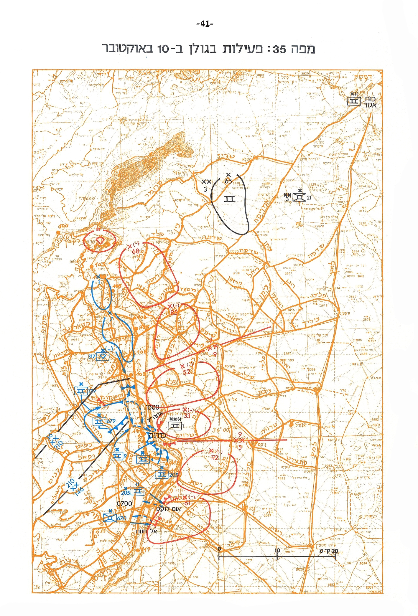 מפה 35 - פעילות בגולן ב-10 לאוקטובר - מלחמת יום הכיפורים